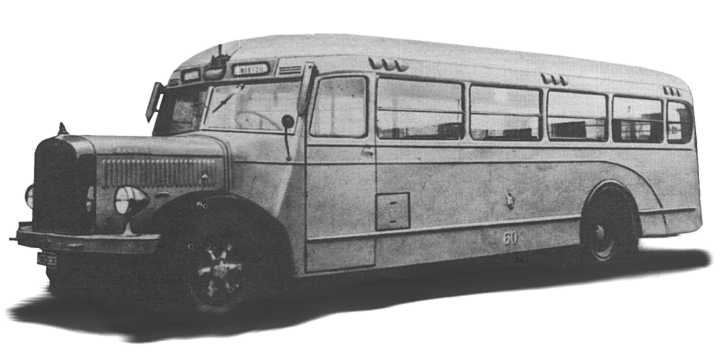 Autobus Zawrat linii "G" montowany na licencji firmy Saurer z nadwoziem wykonanym w PZInż.